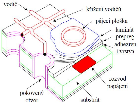 Nákres drátového plošného spoje multiwire